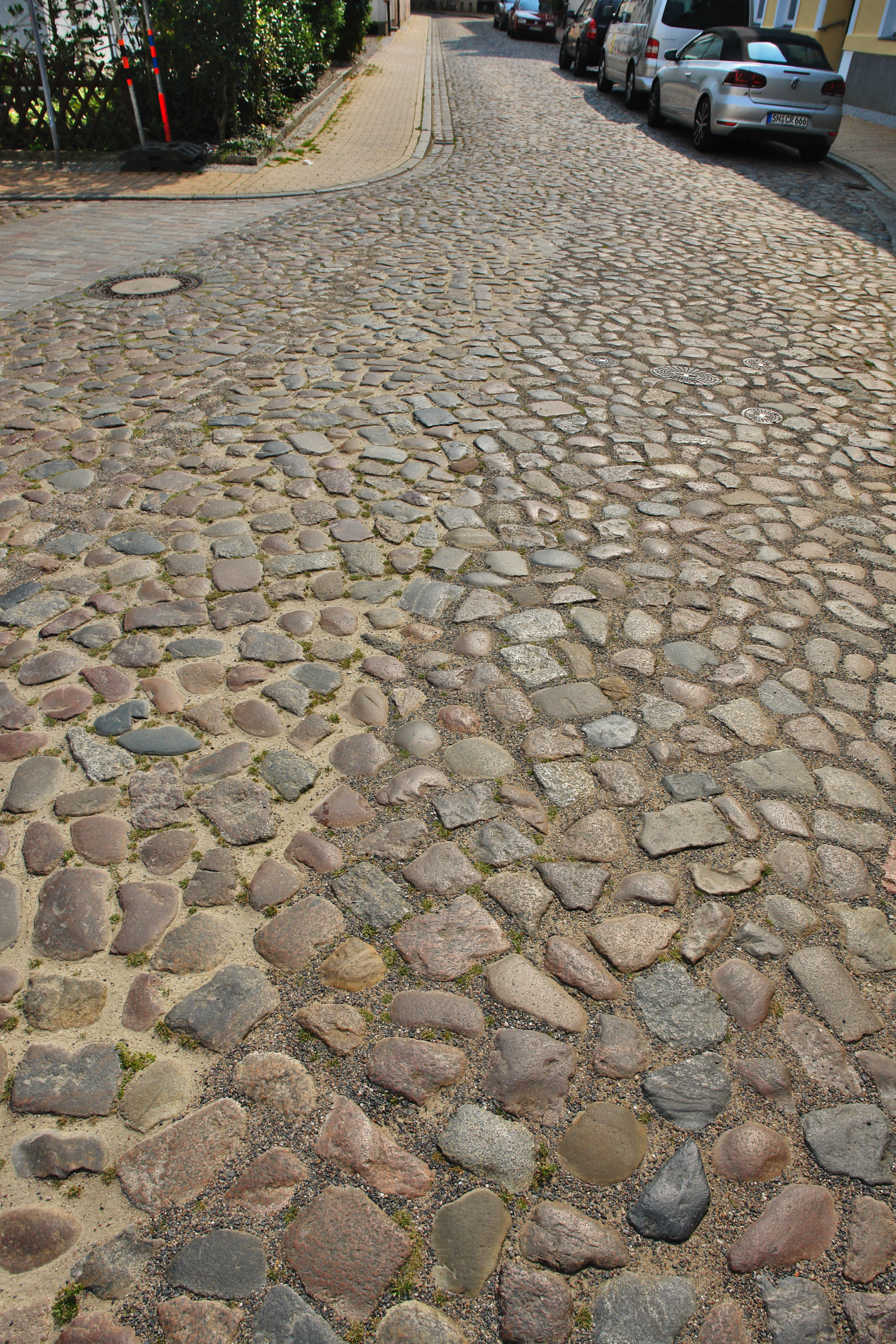 Kopfsteinplaster in der Apothekerstraße Ecke Mühlenstraße, Aufgenommen in Richtung Röntgenstraße, 19055 Schwerin